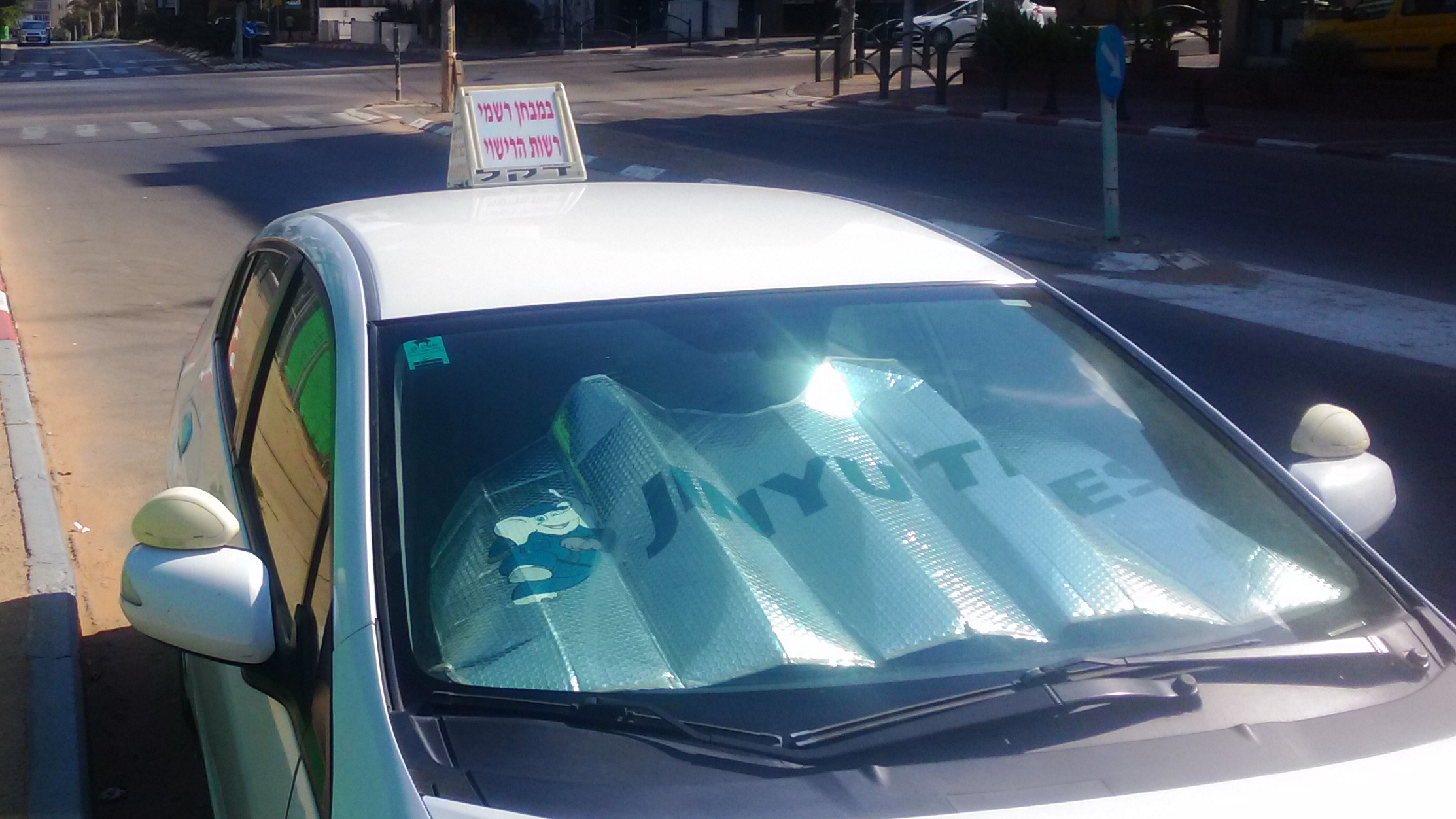 שלט רכב במבחן נהיגה על רכב לימוד נהיגה